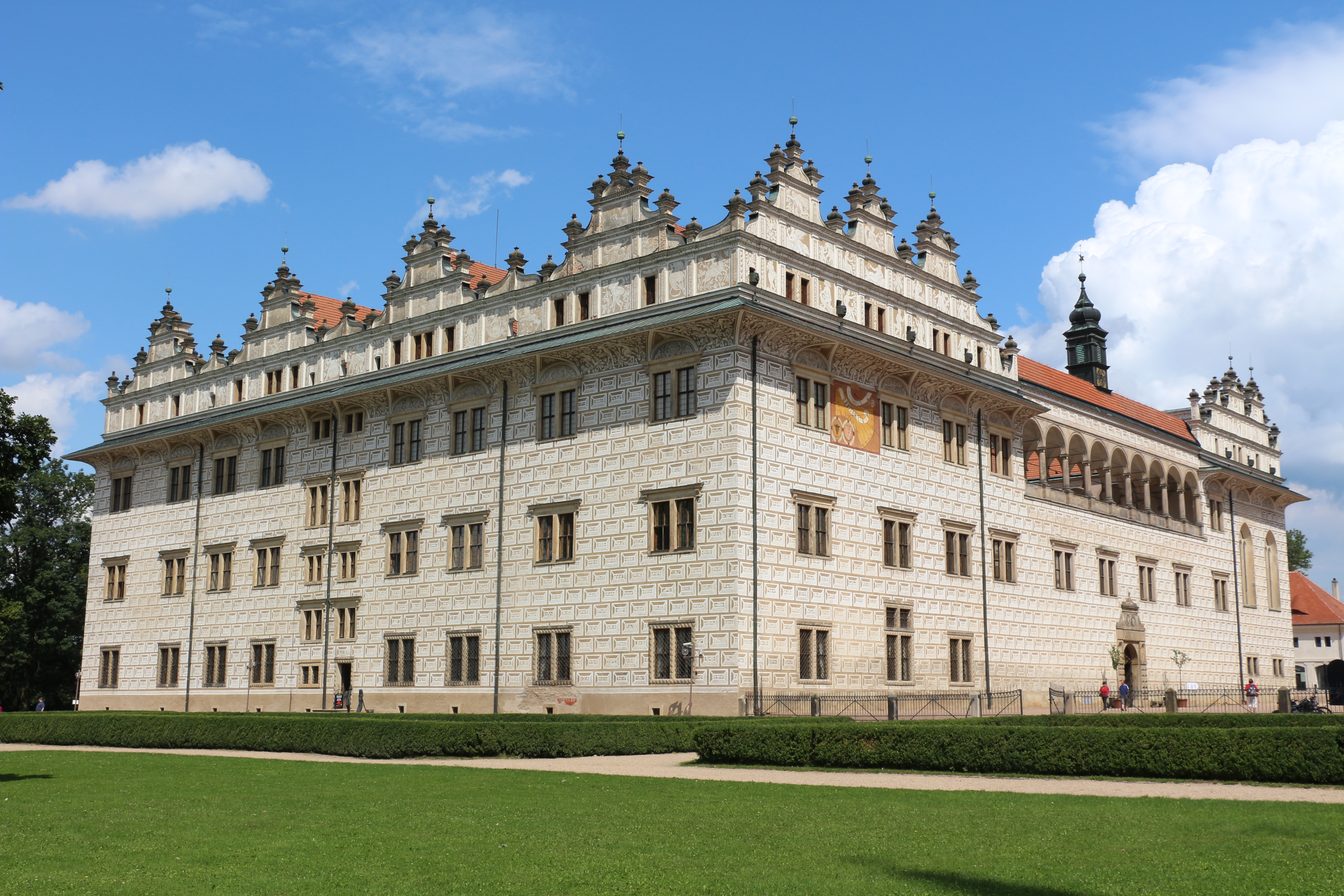 Zámek Litomyšl, Jiráskova 93, 94, 133, 134, Jiráskovo náměstí, Záhradí, Litomyšl.